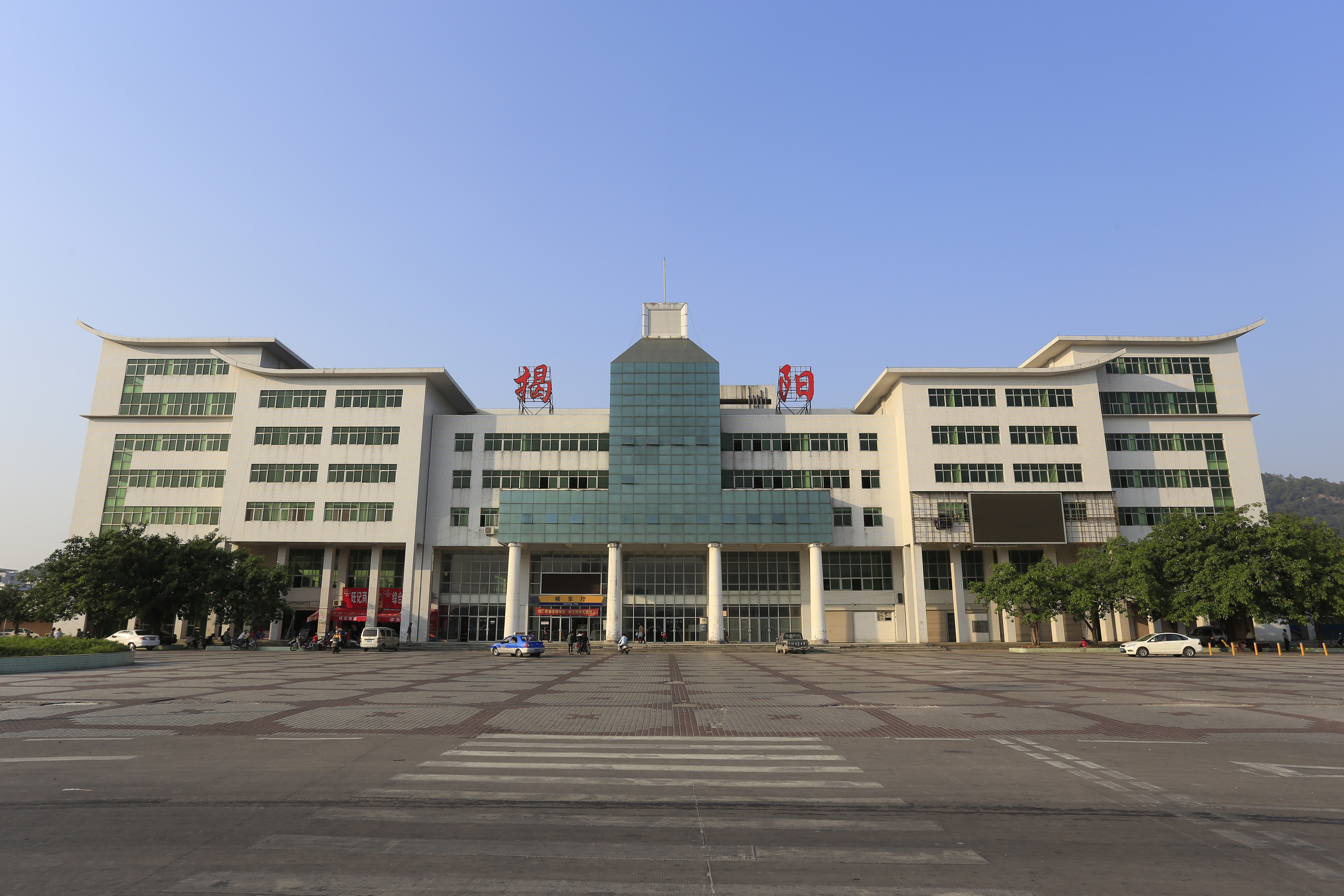 揭阳火车站